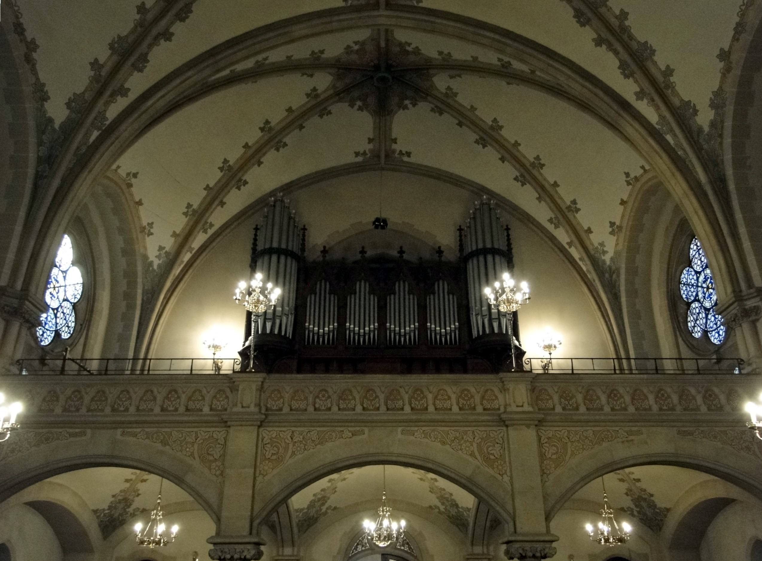 Eule-Orgel in der Himmelfahrtskirche Dresden-Leuben